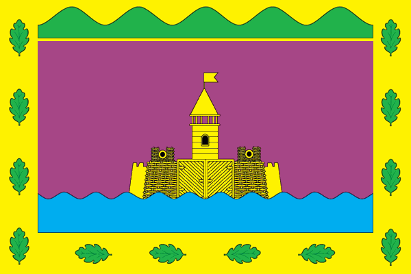 Флаг Абинска, Краснодарский край, Россия.